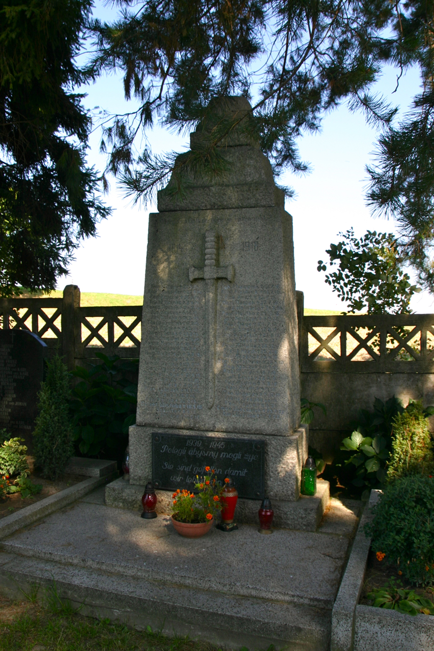 Nowy Browiniec – wieś w Polsce położona w województwie opolskim, w powiecie prudnickim, w gminie Lubrza.